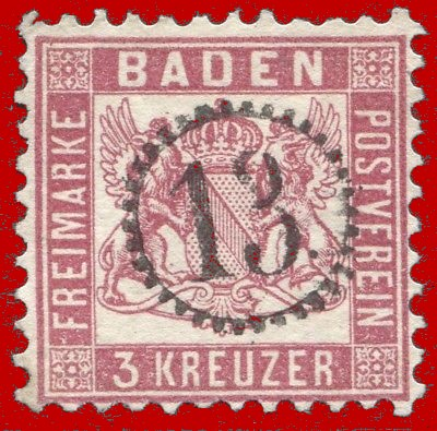 Uhrradstempel - hier Nr. 13 auf Baden/3 Kreuzer - waren Poststempel, die ab 1859 in Baden eingesetzt wurden.